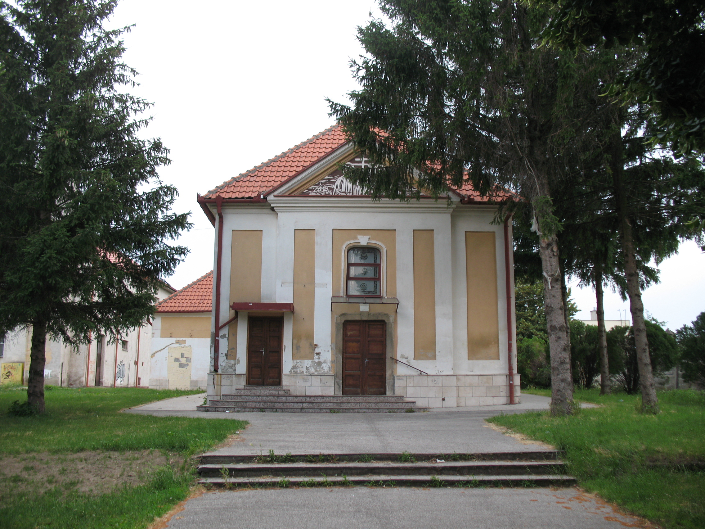 Vágpatta